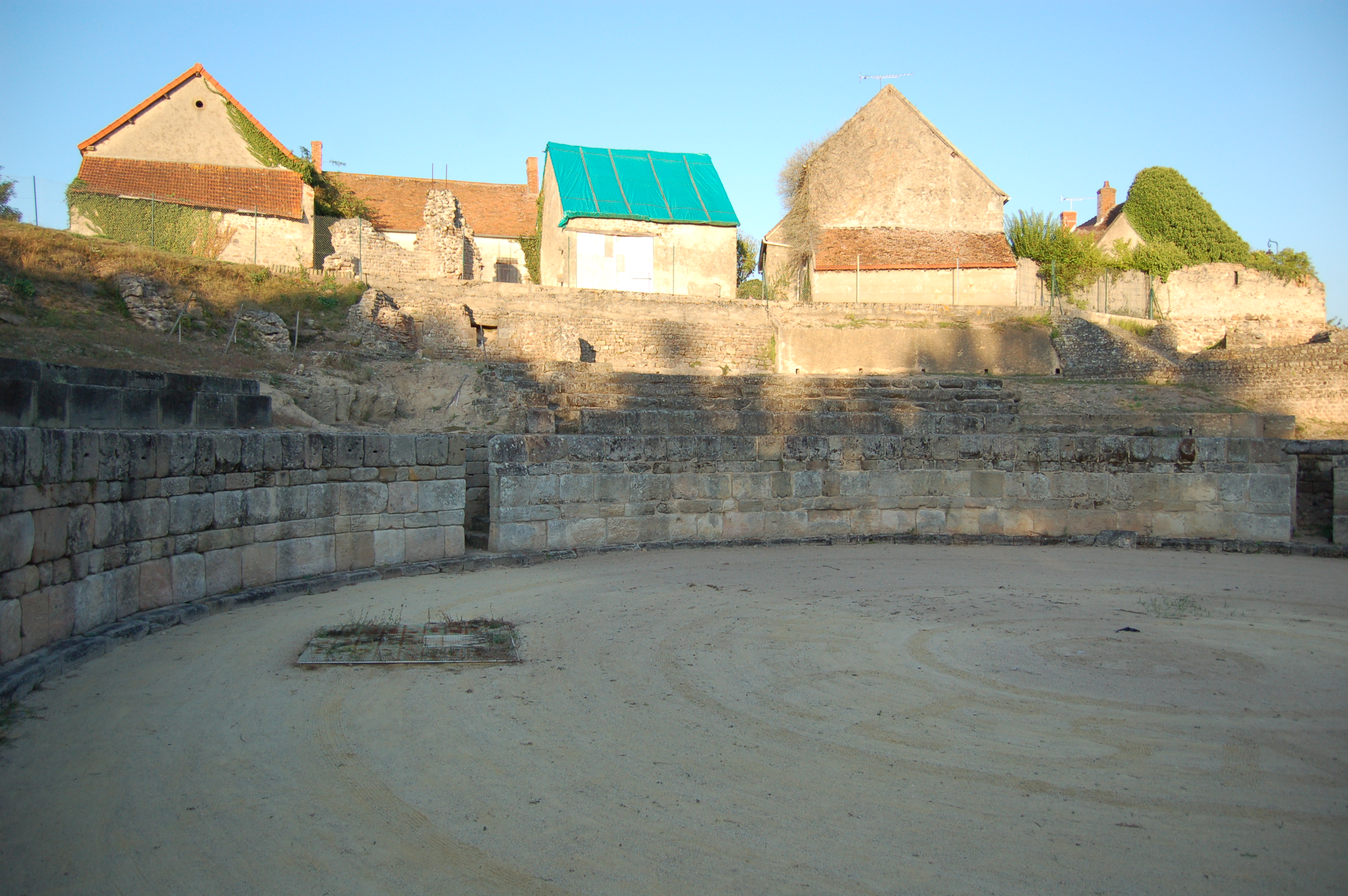 L'amphithéâtre gallo-romain de Drevant, Cher, France.